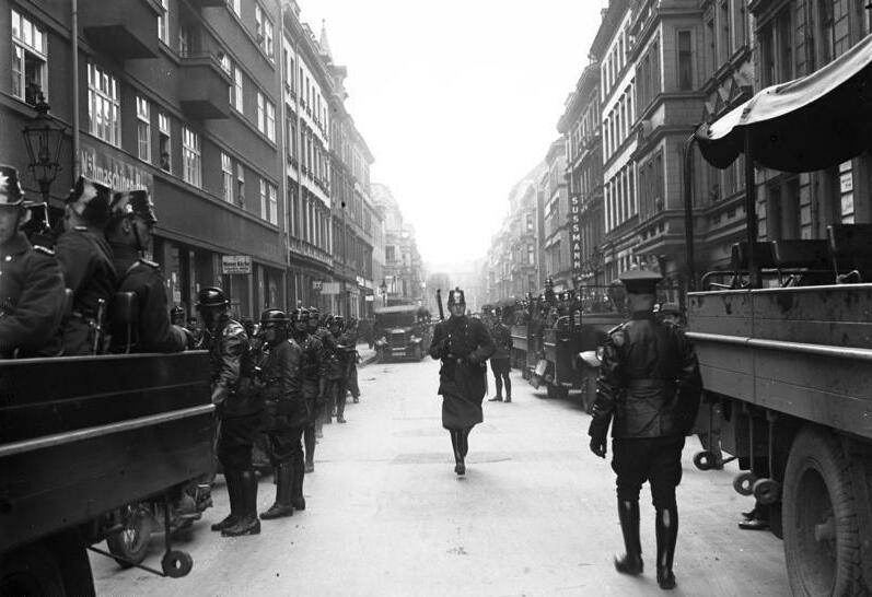 Berliner Schutzpolizei und nationalsozialistische Hilfspolizei durchsuchen das Berliner Judenviertel in der Grenadierstraße und Dragonerstraße nach kommunistischen Flugblättern und lästigen Ausländern! Schnellwagen der Schutzpolizei und der nationalsozialistischen Hilfspolizei in der Grenadierstraße im Judenviertel in Berlin.